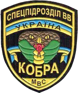 Гірськострілецький батальйон спеціального призначення внутрішніх військ МВС України